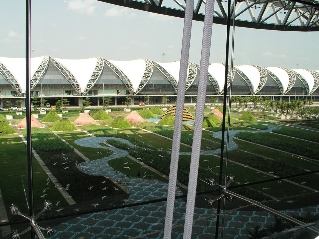 Bangkok, Suvarnabhumi Airport